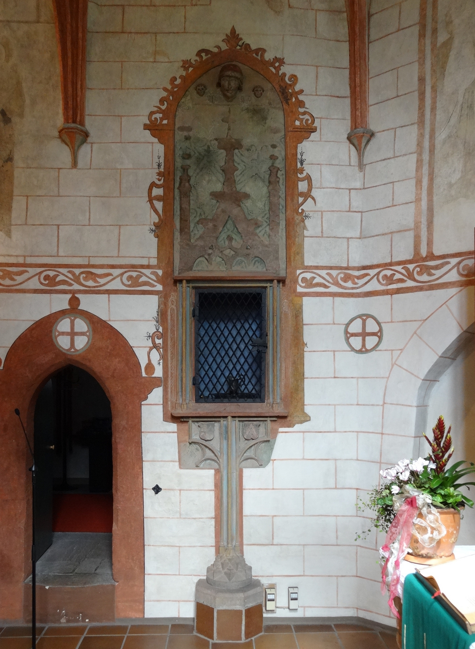 Evangelische Kirche (Heuchelheim, Hessen)